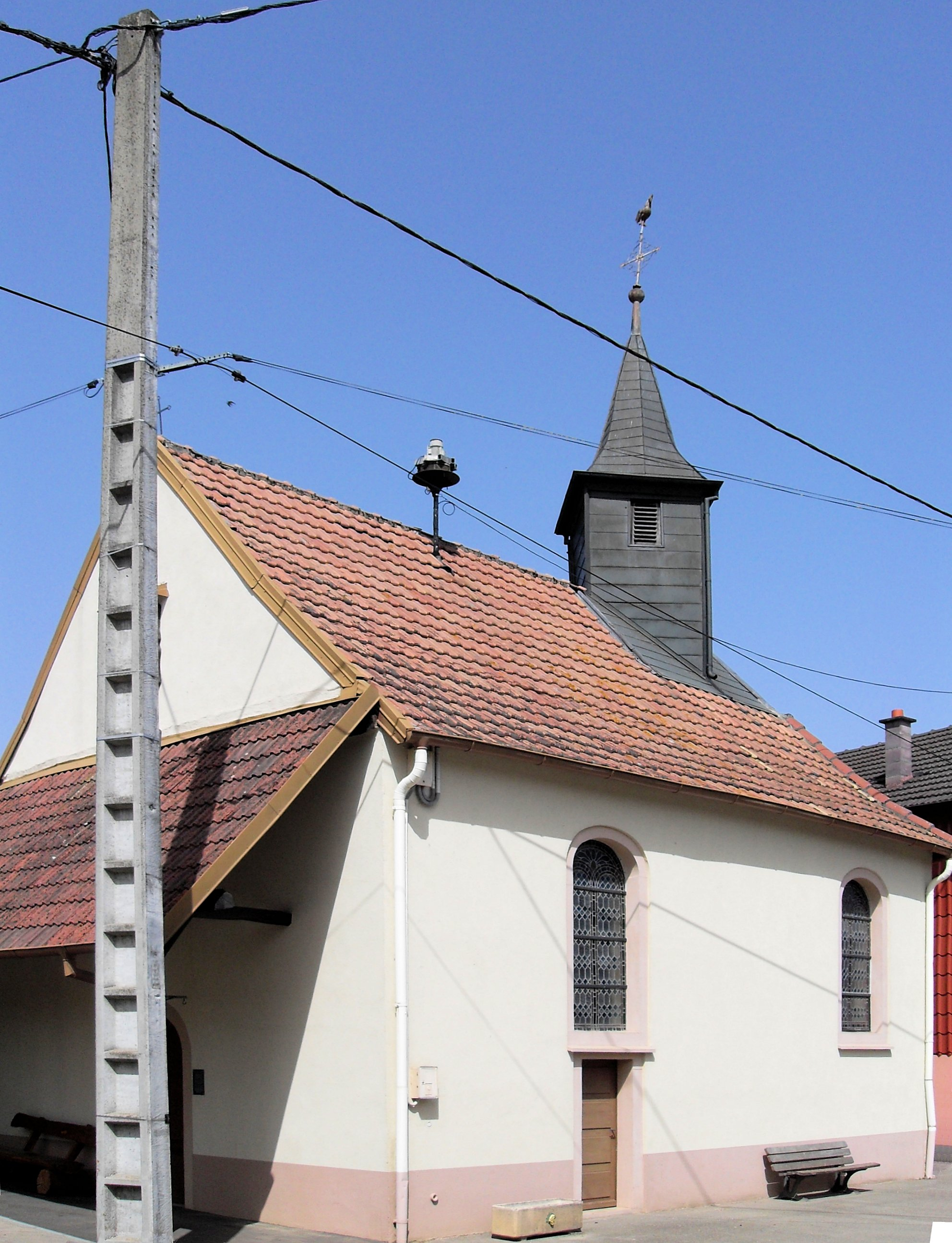 La chapelle Saint-Fridolin à Traubach-le-Bas